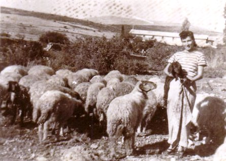 תמרה כהן עם עדר הכבשים